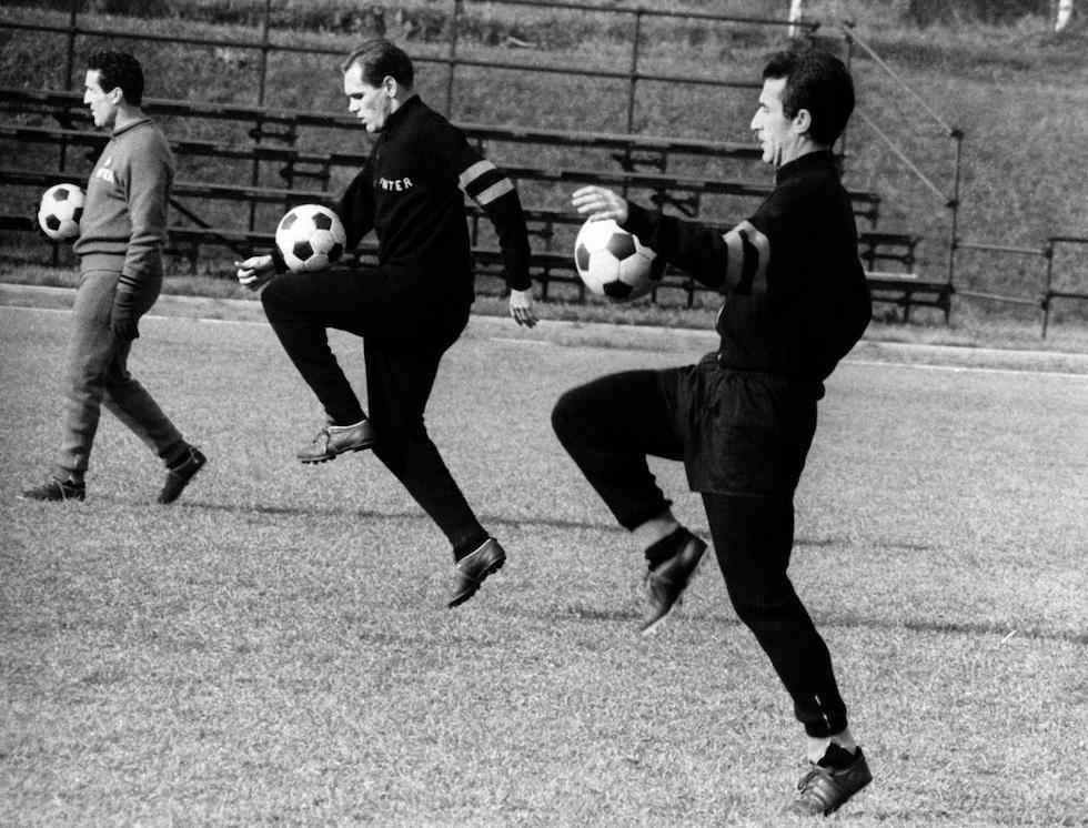 Appiano Gentile, novembre 1966. Da sinistra: il tecnico franco-argentino Helenio Herrera, l'attaccante brasiliano Luís Vinício e il difensore italiano Armando Picchi durante un allenamento dell'Inter.